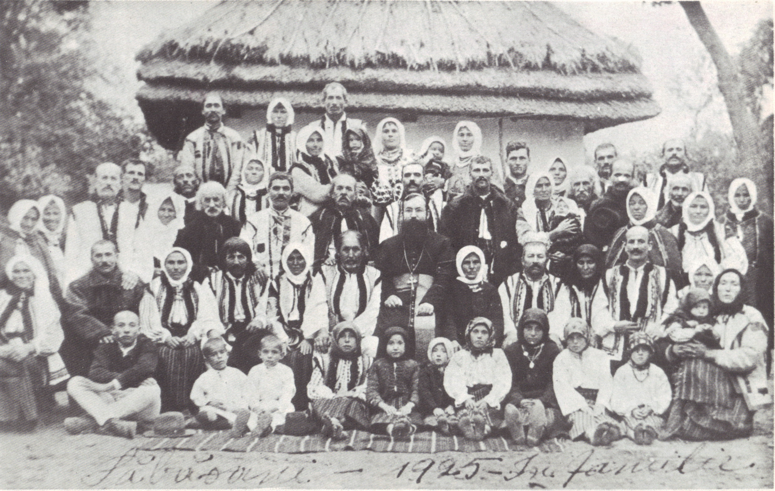 Episcopul Mihai Robu (1884-1944) în mijlocul sătenilor din Săbăoani, în 1925